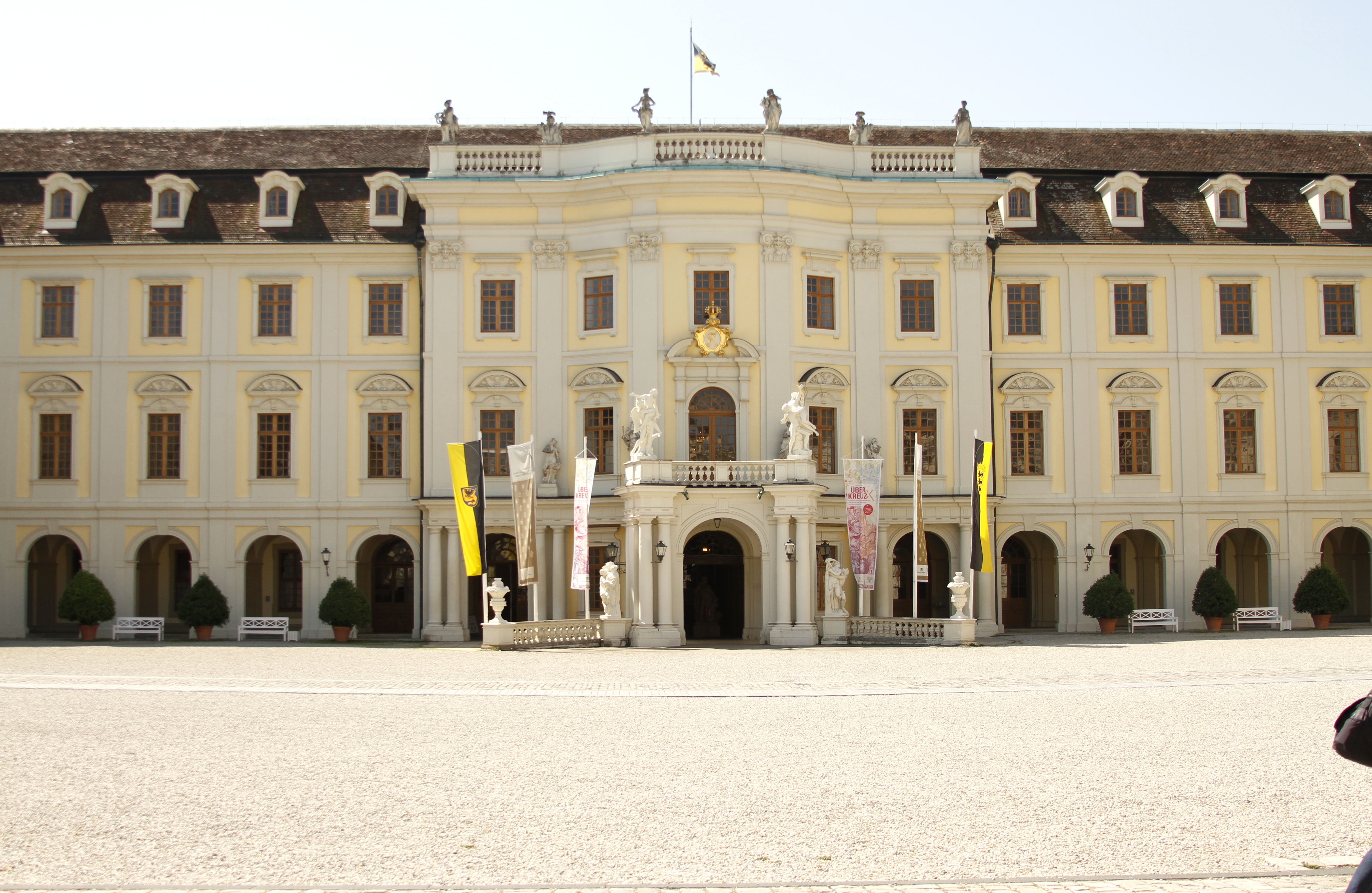 Ludwigsburg Castle - Ludwigsburg - Germany